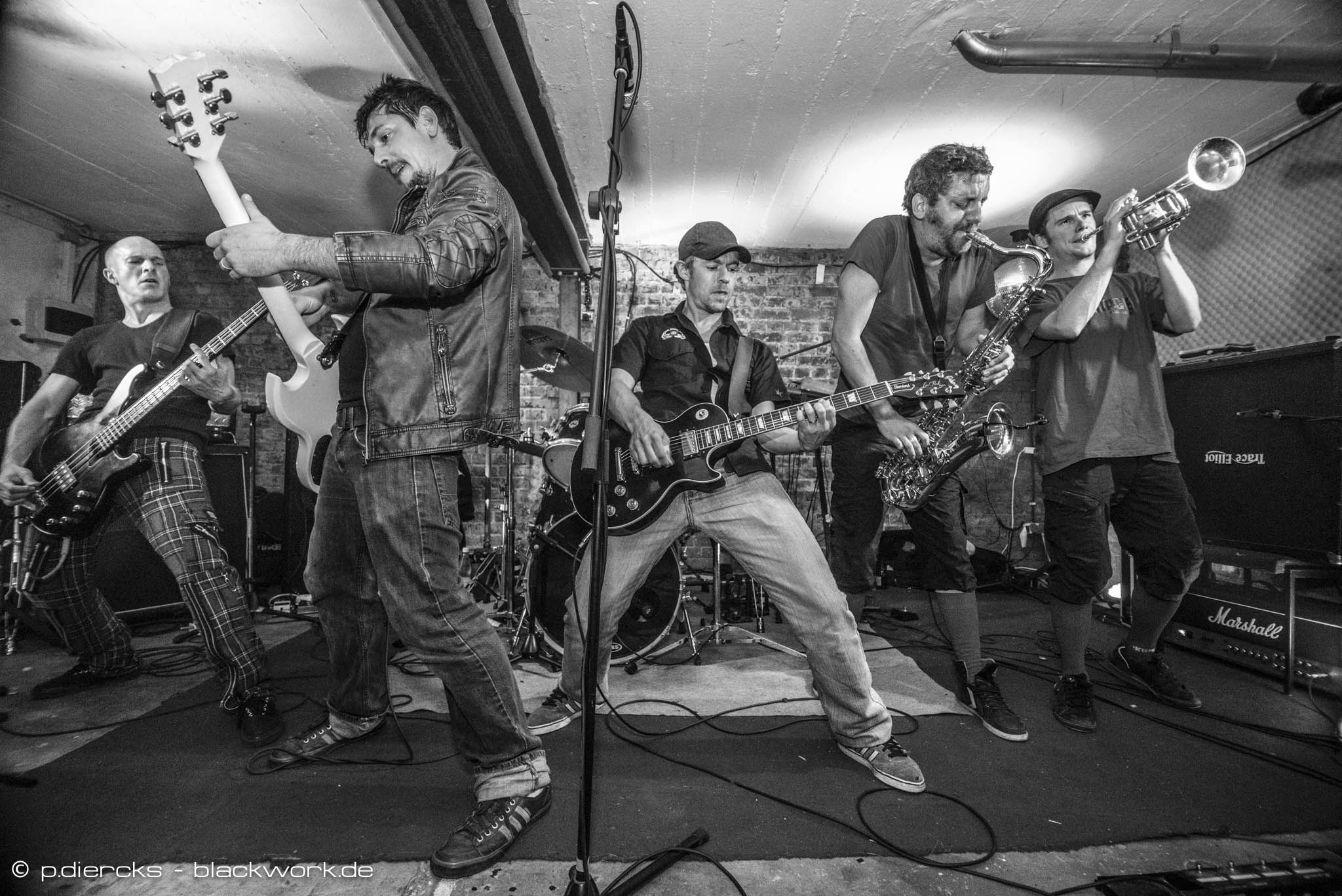 photo du groupe Outrage à la Villa Rottenburg